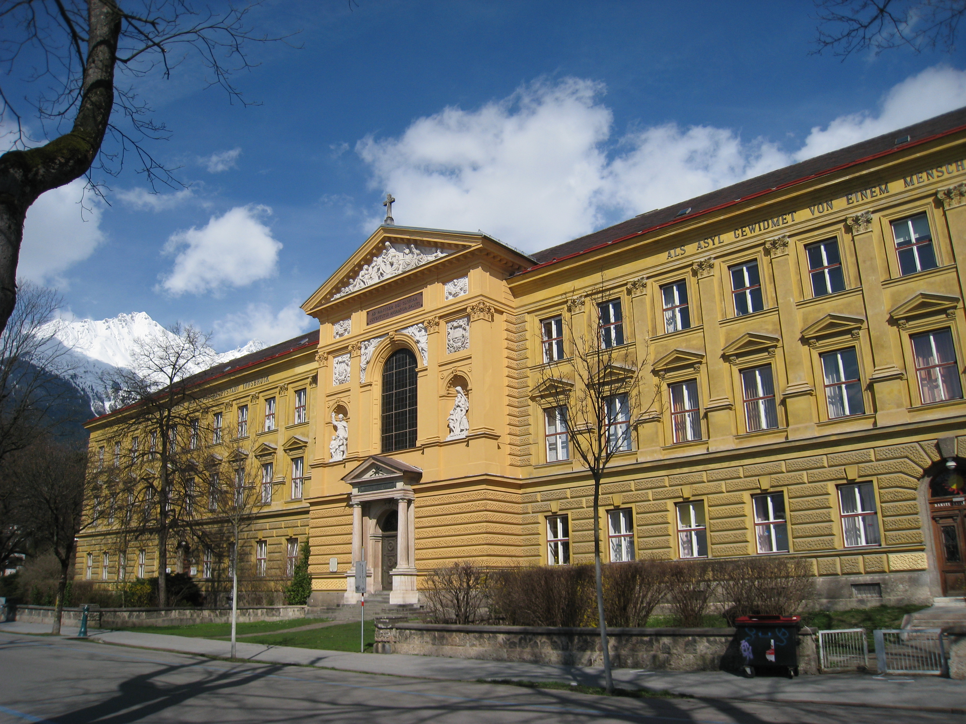 Innsbruck, Austria - Waisenhausstiftung Johann v. Sieberer.